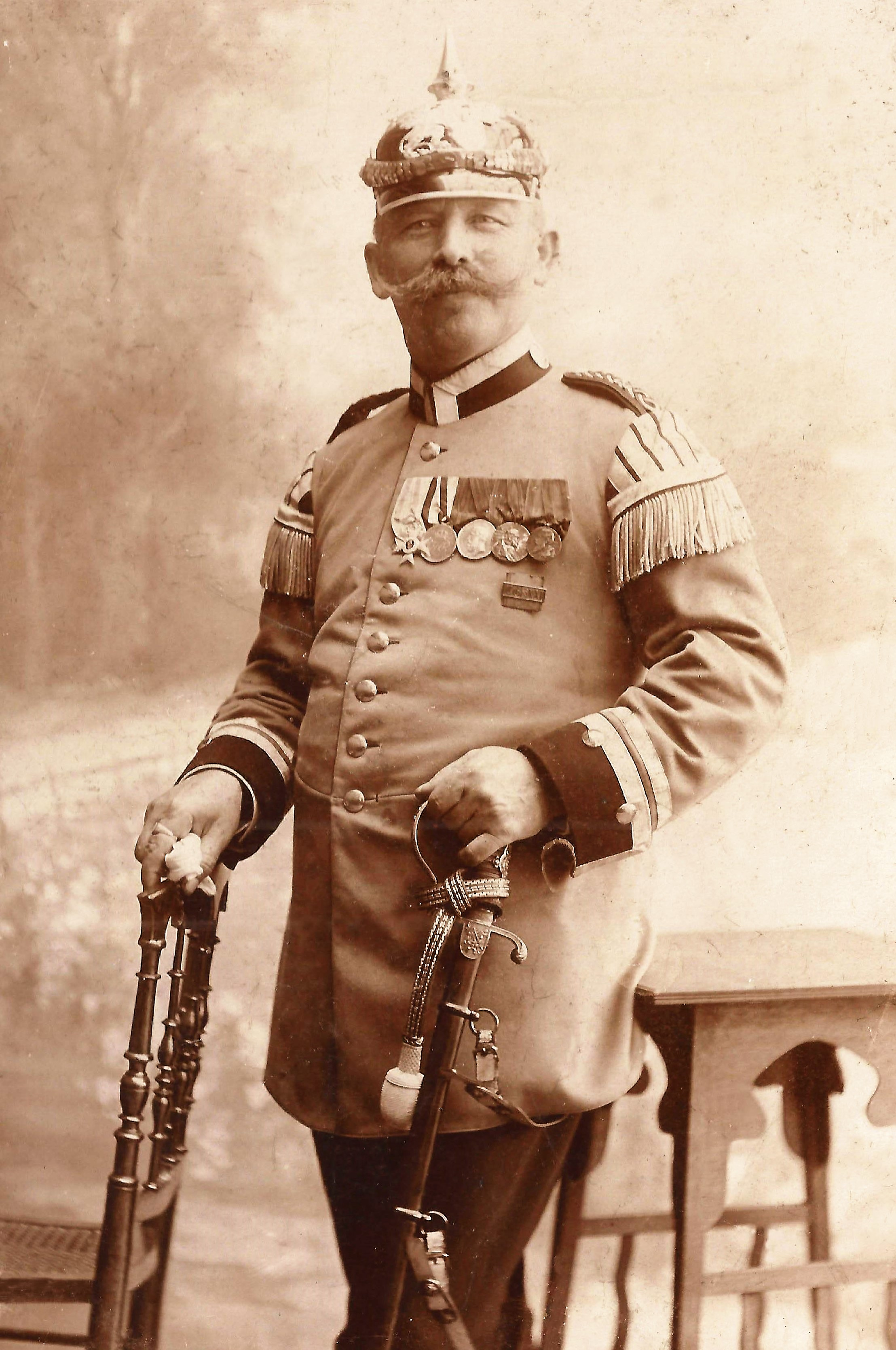 3. Badisches Dragoner-Regiment "Prinz Karl" Nr. 22